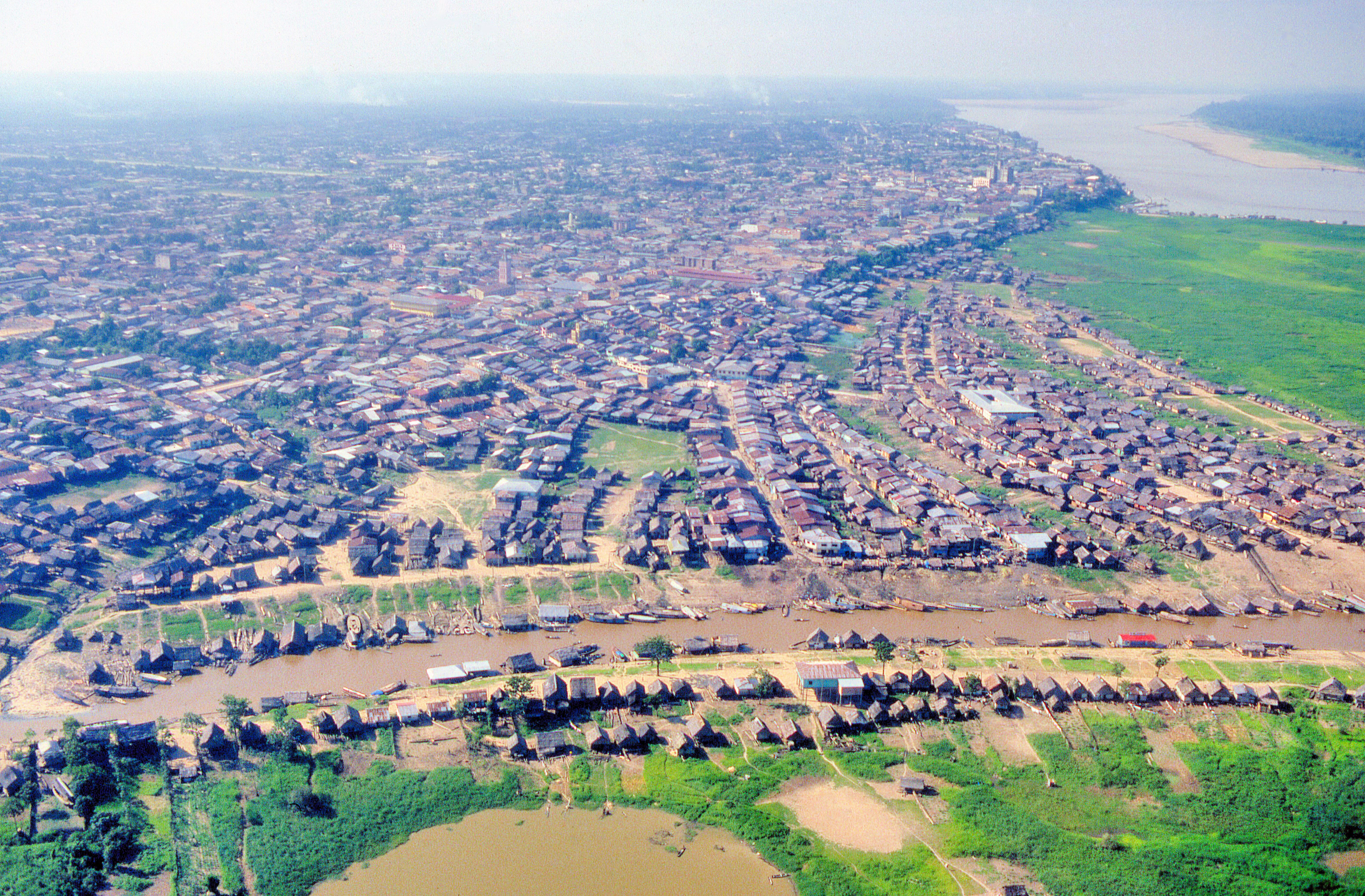 Iquitos_et_l'Amazonie_983.jpg perou